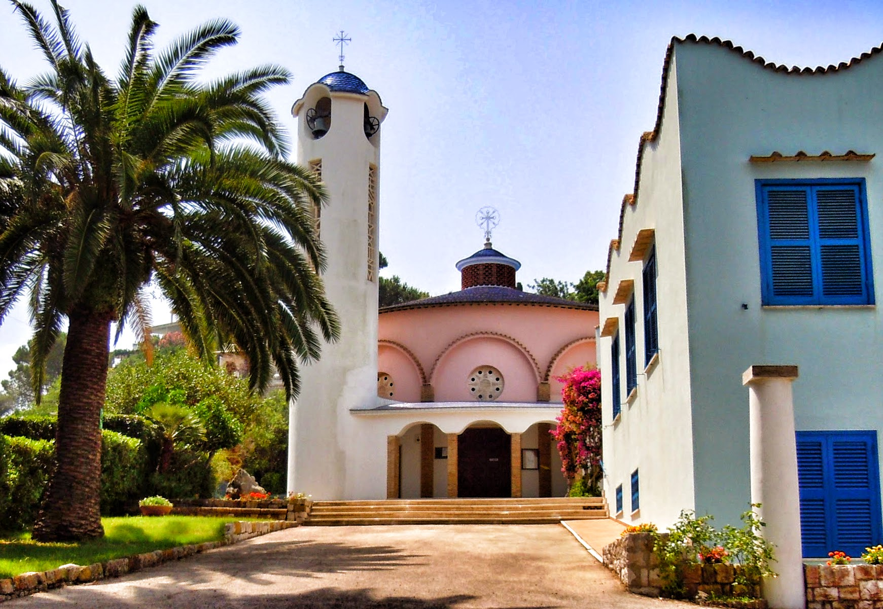 Chiesa della Madonna Immacolata a San Felice Circeo, diocesi di Latina